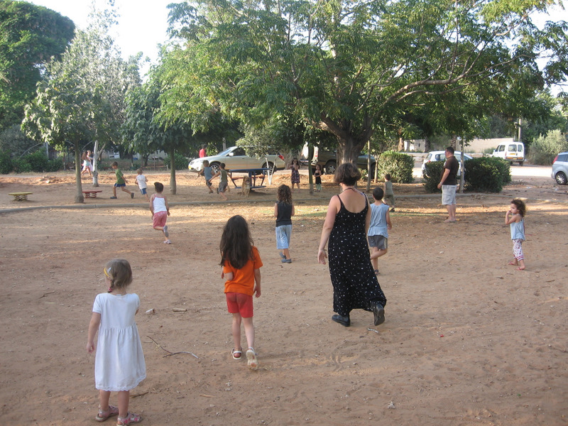 משחק מחבואים וגנבים